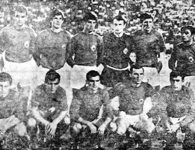 Stojijo od leve: Mirsad Fazlagić, Vahidin Musemić, Blagoje Paunović, Ilija Pantelić, Ivica Osim, ?. Čepijo od leve: Ilija Petković, Dragan Holcer, Miroslav Pavlović, Dobrivoje Trivić in Dragan Džajić.